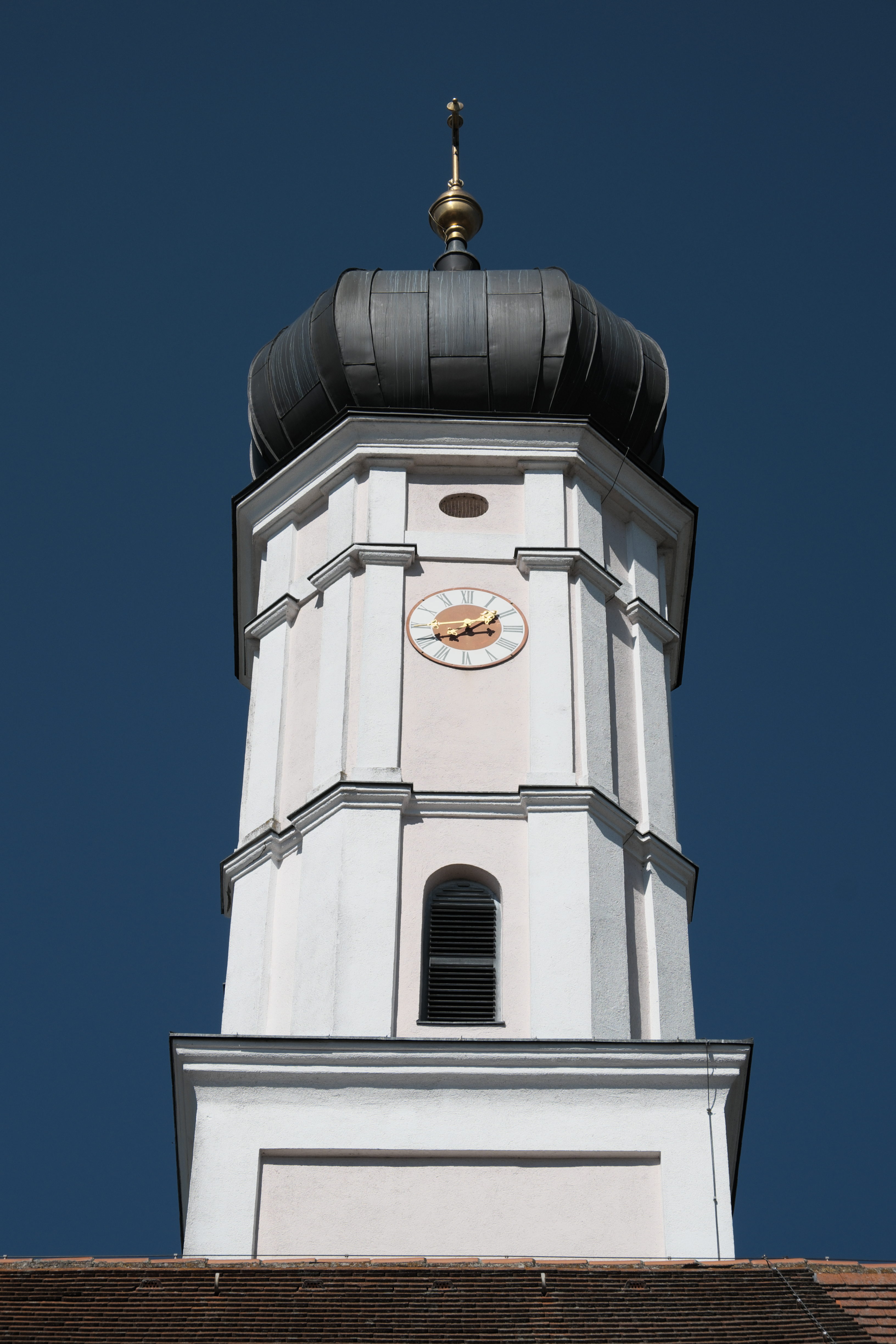 Katholische Filialkirche Heilig Kreuz in Holzhausen (Alling) im Landkreis Fürstenfeldbruck (Bayern/Deutschland), Glockenturm mit Zwiebelhaube